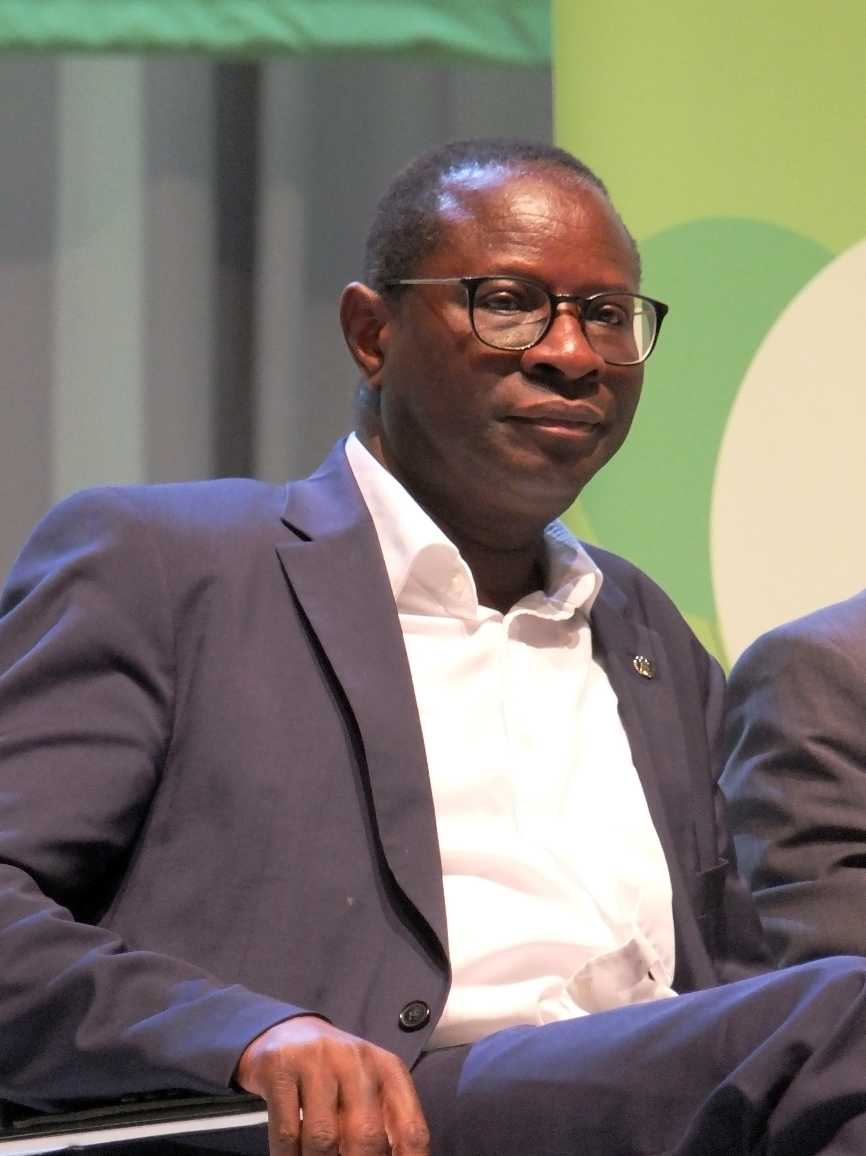 Diaby Diaby (deutscher Politiker (SPD)) bei der Podiumsdiskussion beim Deutschen Evangelischen Kirchentag 2019.